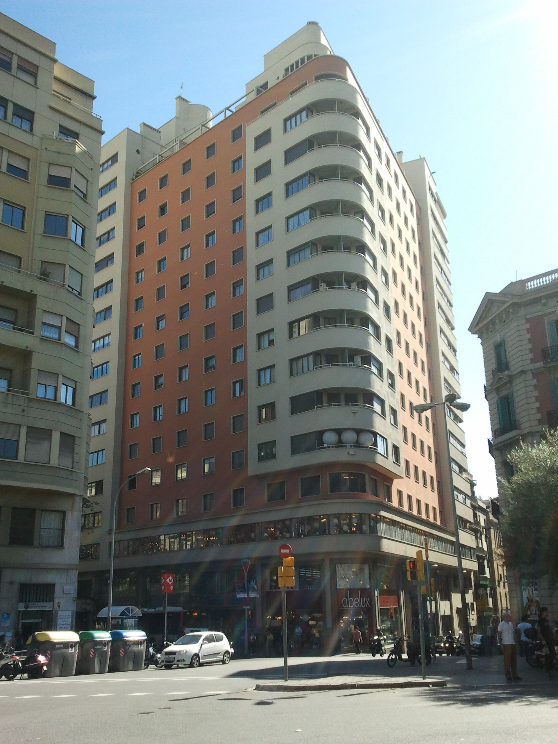 Gratacels Urquinaona (Barcelona)